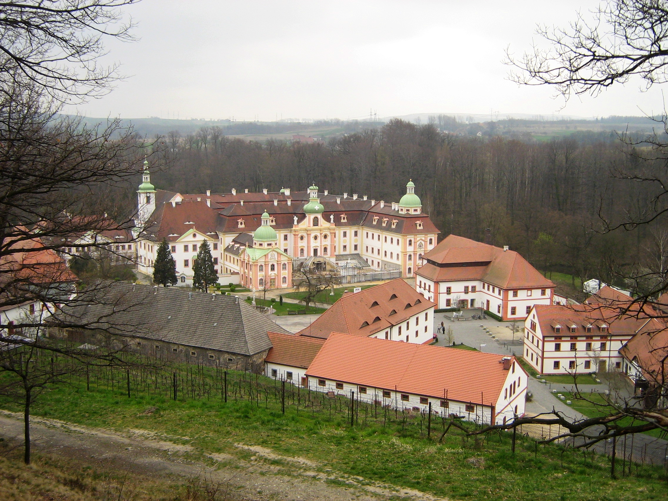 Kloster St. Marienthal in der Oberlausitz, Sachsen. Blick vom Kalvarienberg über den Weinberg.